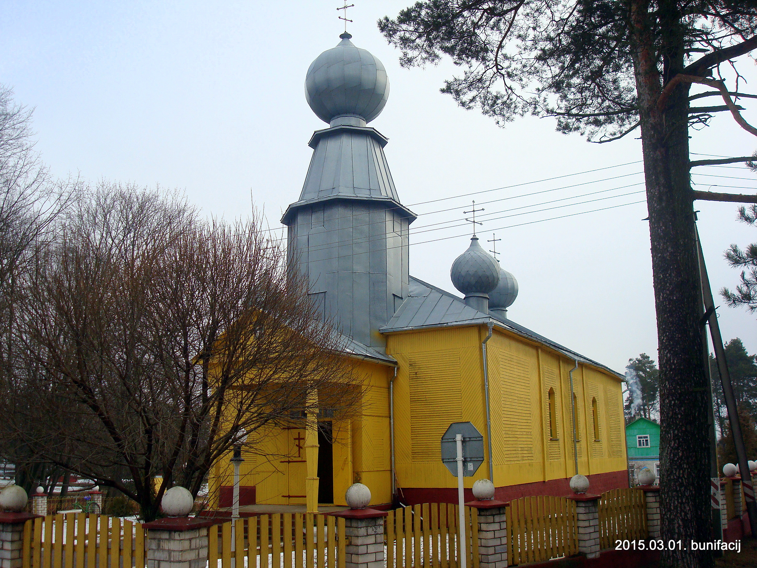 Церковь в Воропаево